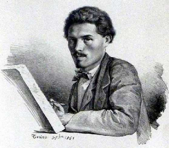 autoritratto, by Pier Celestino Gilardi